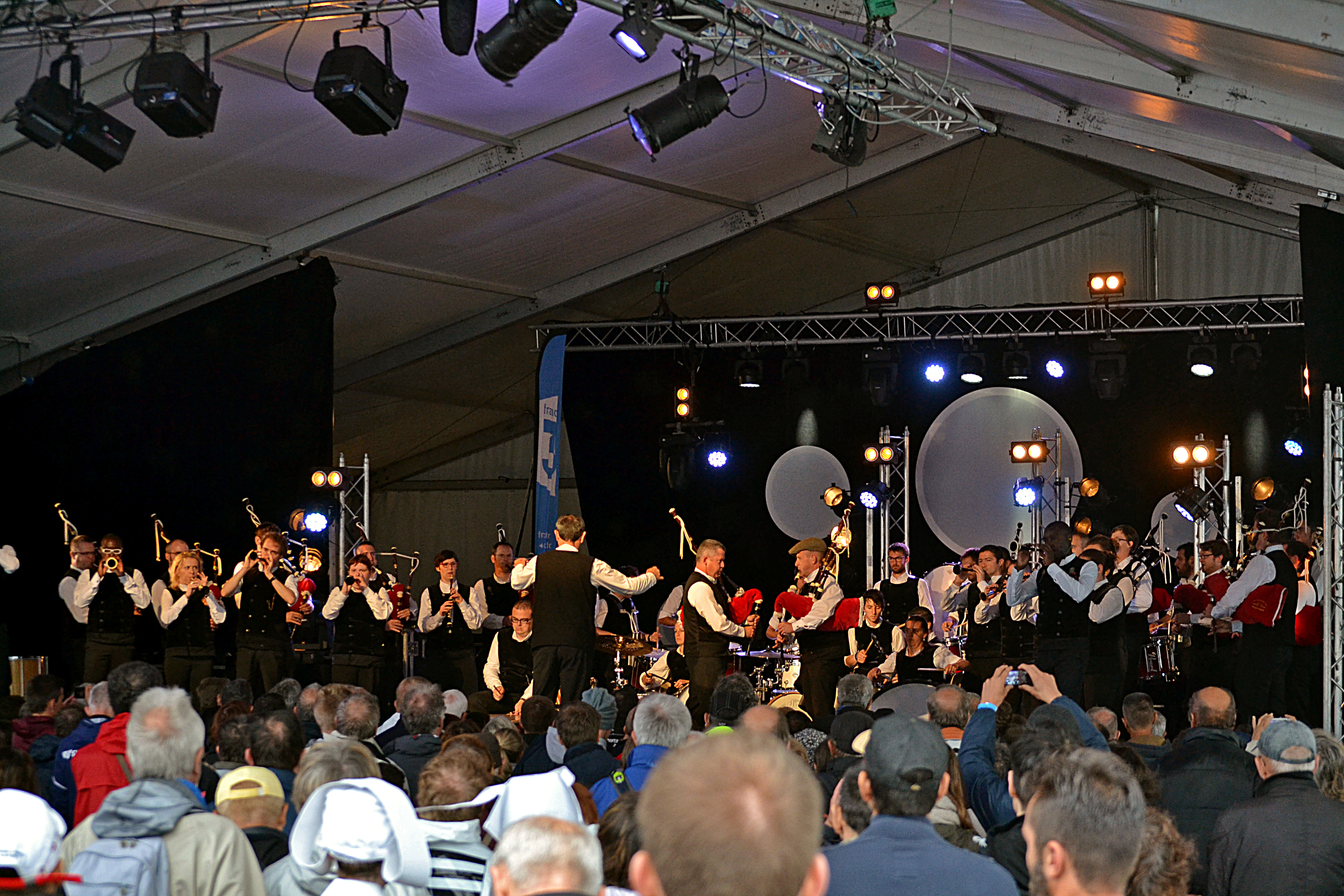 Le Bagad Cap Caval sur scène lors du Festival de Cornouaille à Quimper le dimanche 26 juillet 2015.